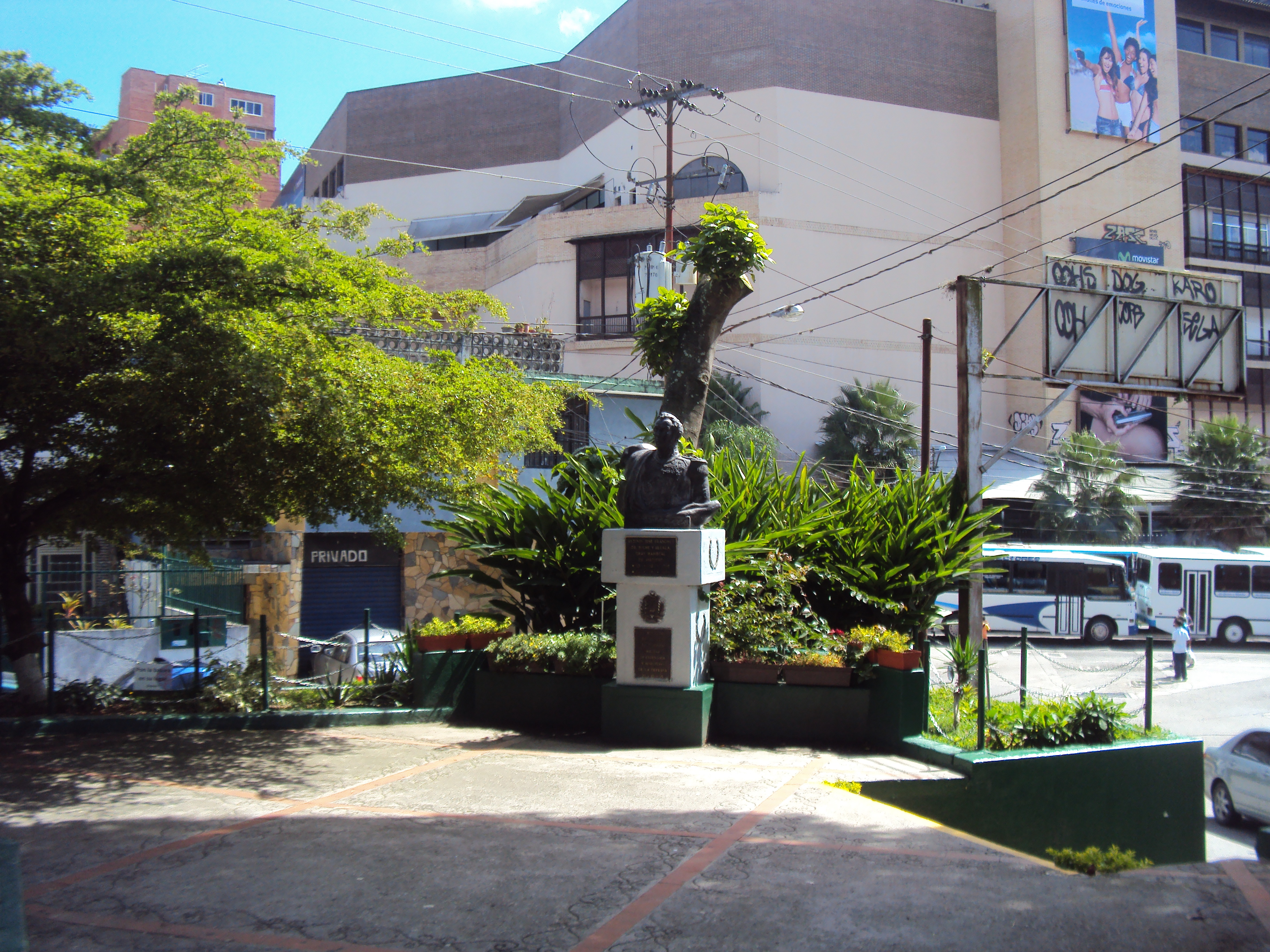 Plaza Sucre